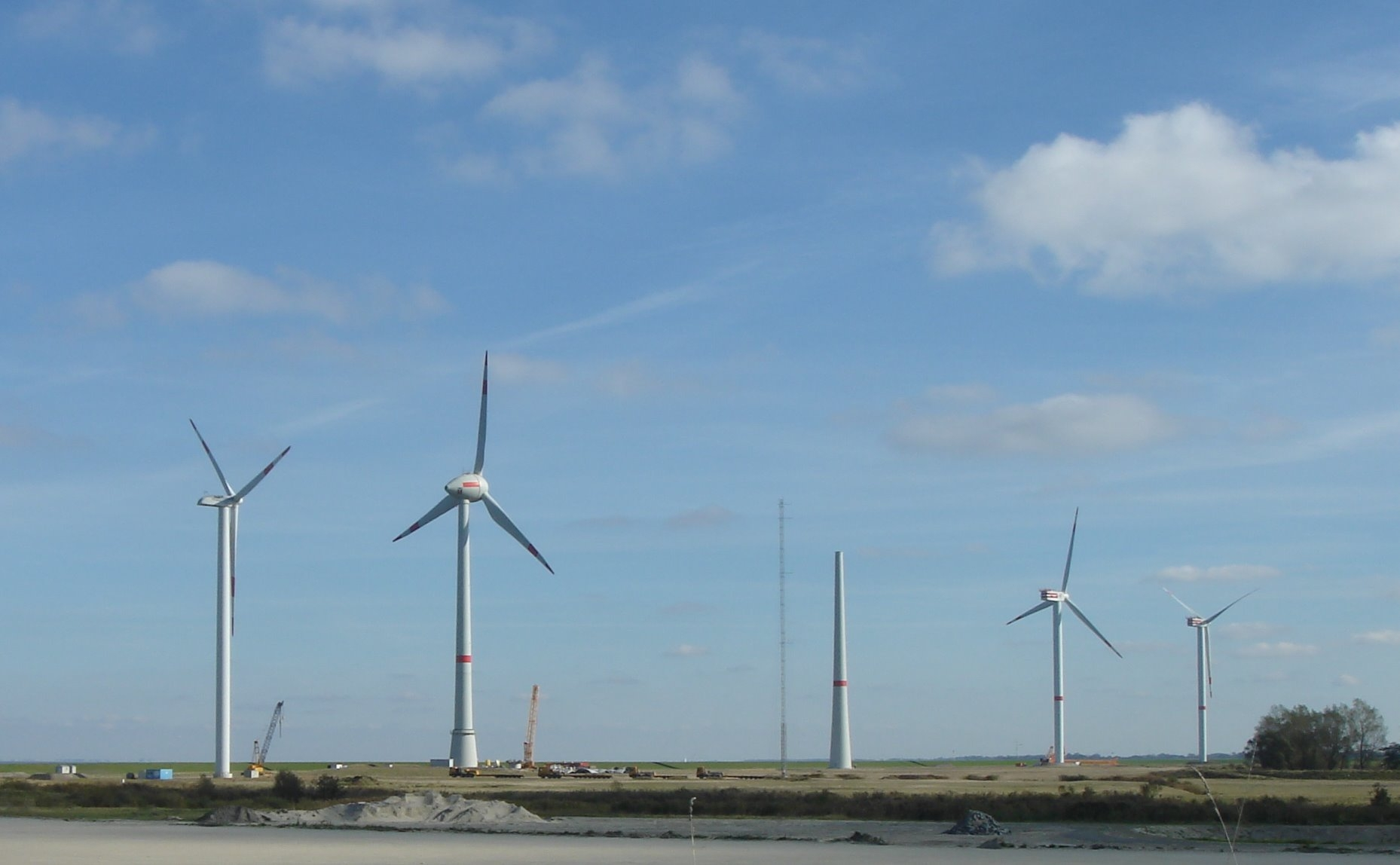 Offshore-Windenergie Testfeld in Cuxhaven - Die leistungsstärkste Windenergieanlage der Welt (E112 von der Enercon GmbH) leistet 6 Megawatt und ist als zweite Anlage von links im Bild zu sehen. Ganz rechts sind zwei weitere Prototypen (5M von der Repower AG) der Multimegawattklasse zu sehen. Das von der DEWI-OCC betriebene Testfeld für Offshore-Prototypen befindet sich direkt an der Elbe. Um die Dimensionen dieser Prototypen zu verdeutlichen: Die E112 hat einen Rotordurchmesser von 114 m und eine Nabenhöhe von 124 m